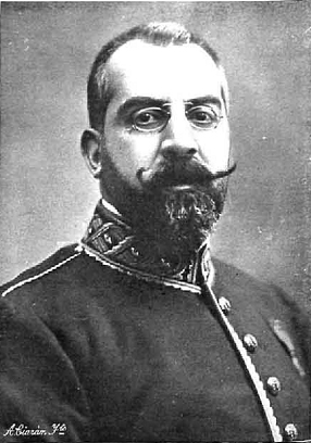 Retrato de Augusto González Besada, obra del fotógrafo Kaulak, recogido en la revista española La Ilustración Española y Americana.